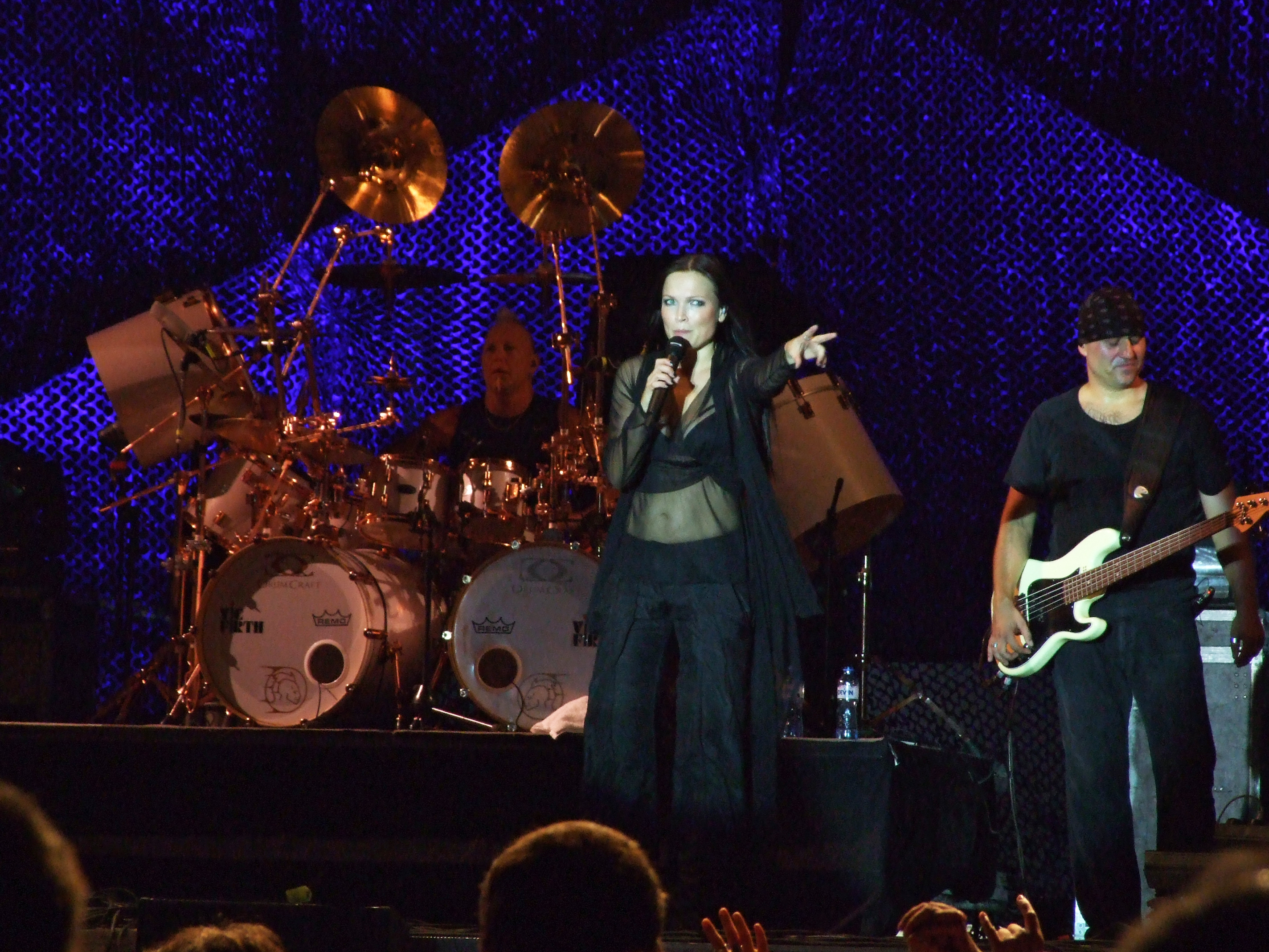 Tarja Turunen at Kavarna Rock Fest - 23 July 2010 - Kavarna, Bulgaria